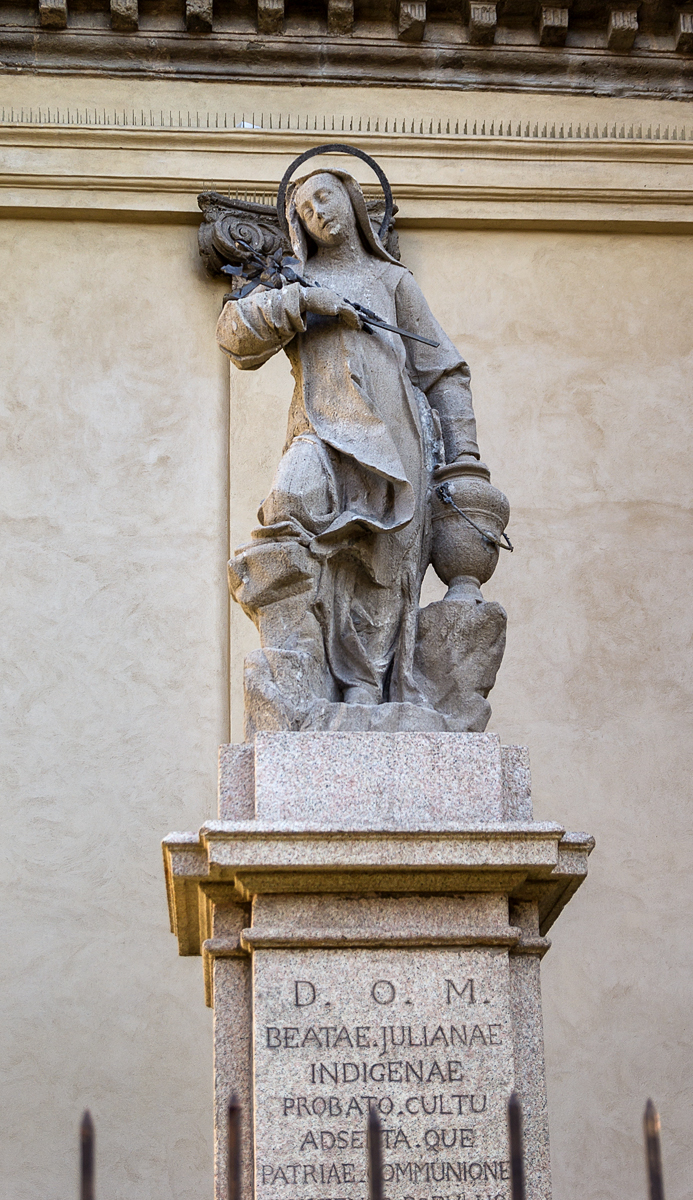 Statua della beata Giuliana Puricelli This is a photo of a monument which is part of cultural heritage of Italy.